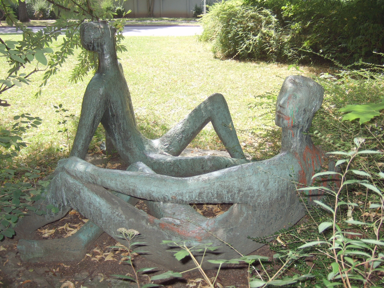 Erich Fritz Reuter: Liegende Jünglinge (1955) – Bonn – Tannenbusch, Oppelner Straße – im Winter 2011/2012 verschwunden (wahrscheinlich gestohlen)